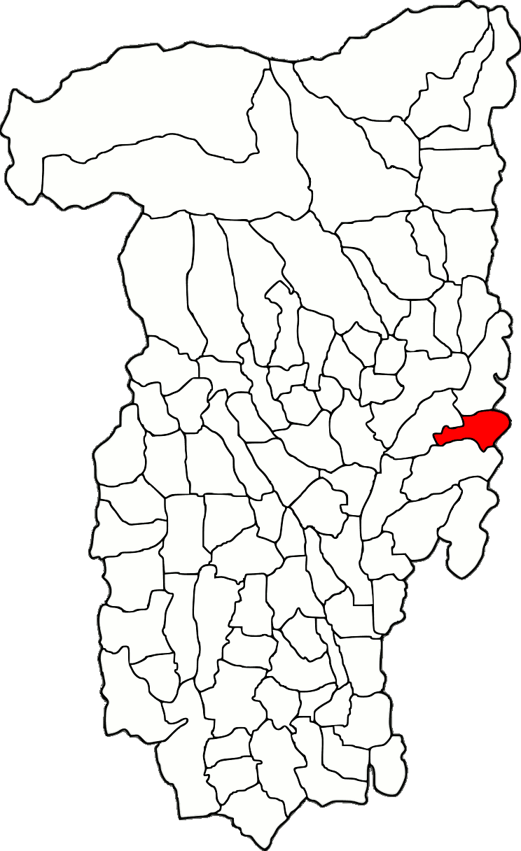 Lage der Gemeinde Milcoiu im Kreis Vâlcea (RO).